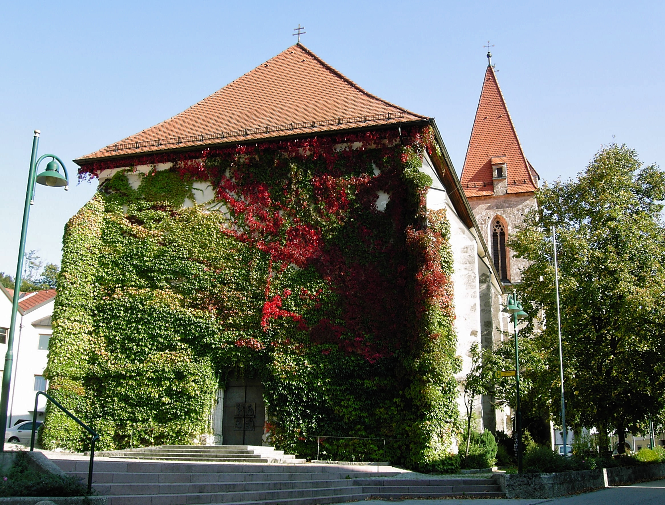 Losenstein Kath.Pfarrkirche hl.Blasius, Ostansicht